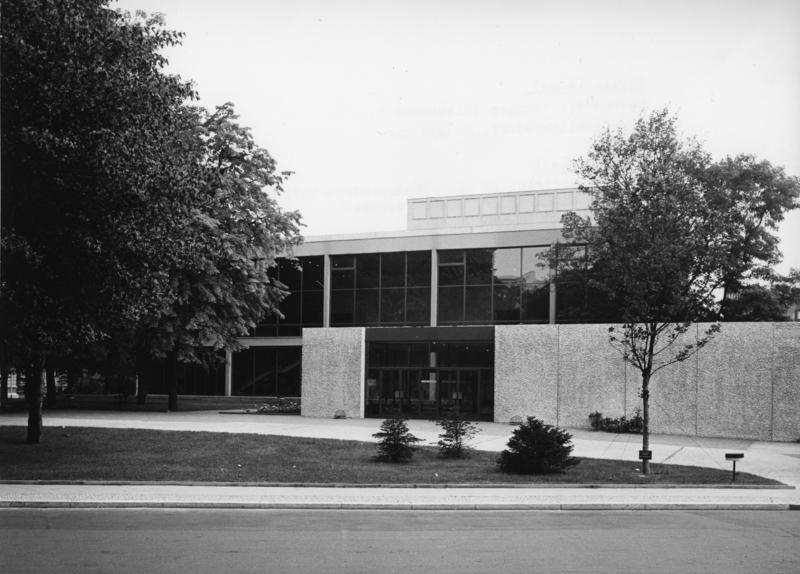 Berlin West Neubau der "Freien Volksbühne" Berlin-Wilmersdorf, Schaperstr.